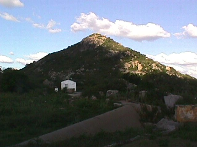 fotografia que retrata o Pico do Totoró e logo abaixo, o sangradouro do Açude Totoró, localizados em Currais Novos-RN-Brasil